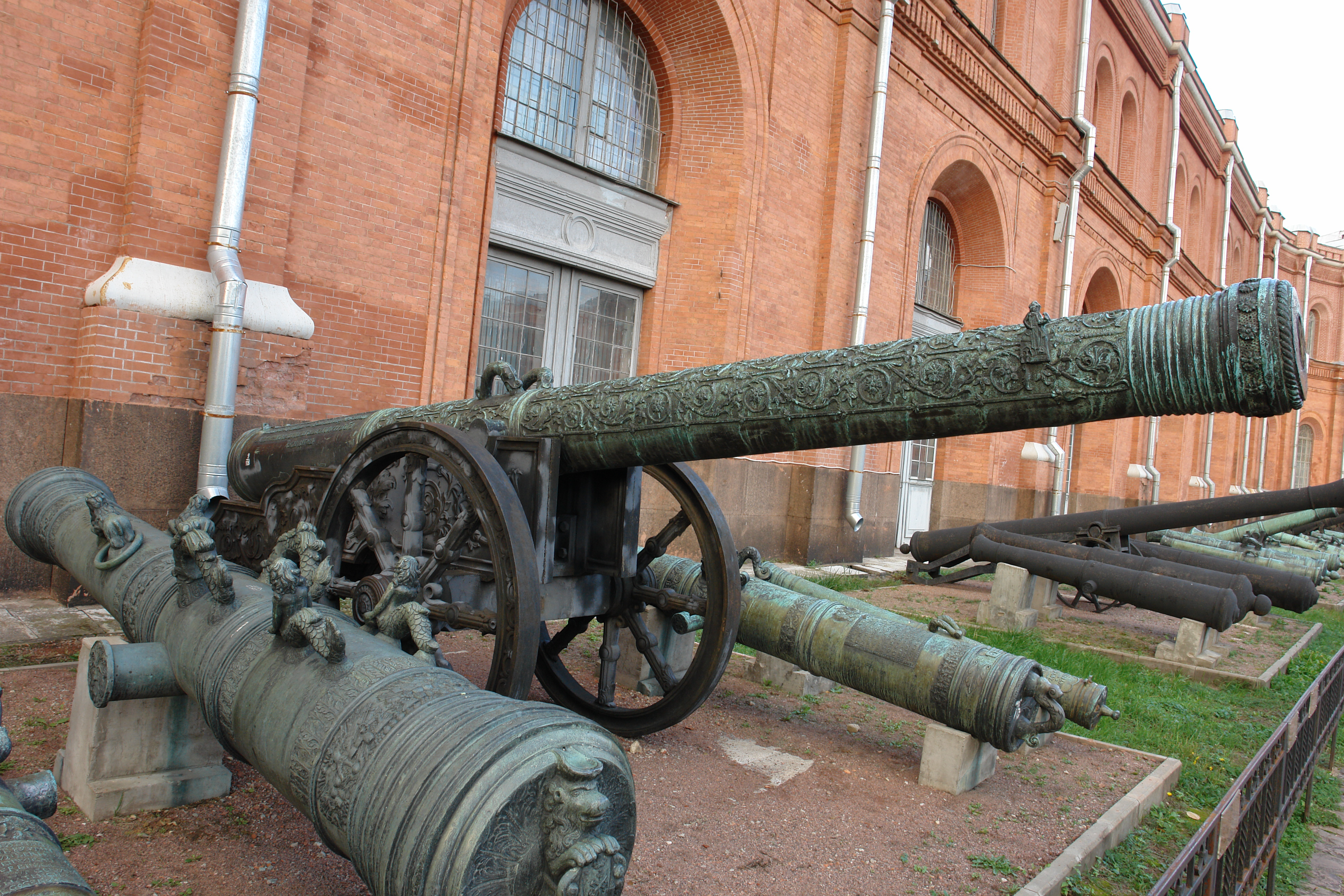 24-гривенковая (152-мм) осадная пищаль "Царь Ахиллес". Ствол бронзовый. Масса 3603 кг. Отлит в 1617 г мастером Андреем Чоховым.